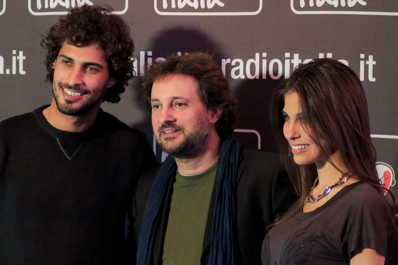 Thyago Alves, Leonardo Pieraccioni e Ariadna Romero all'anteprima del film "Finalmente la felicità" presso Radio Italia a Cologno Monzese MI il 15/12/2011. - Foto donata a Wikipedia.